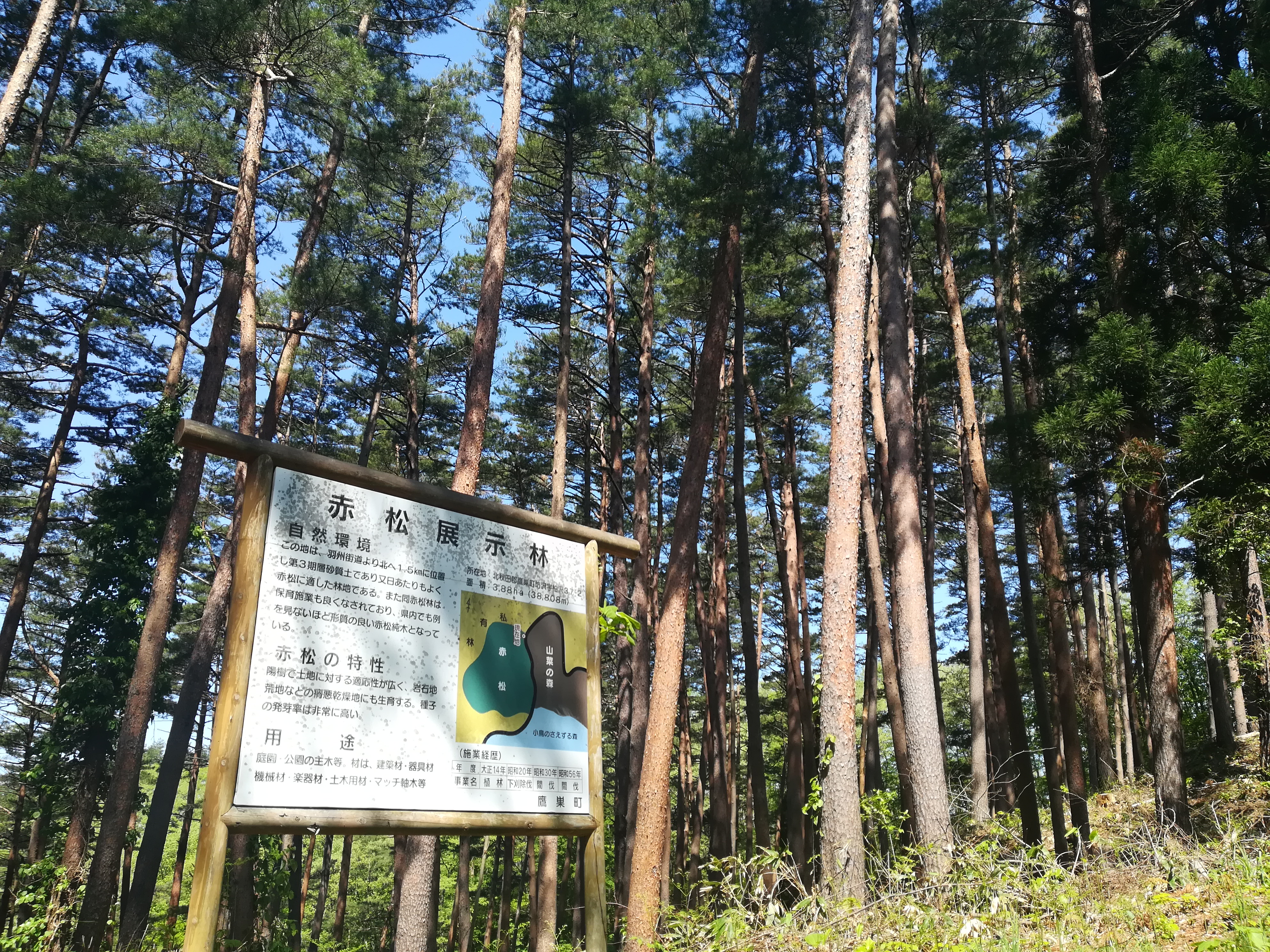 慶祝森林自然公園 赤松展示林：秋田県北秋田市